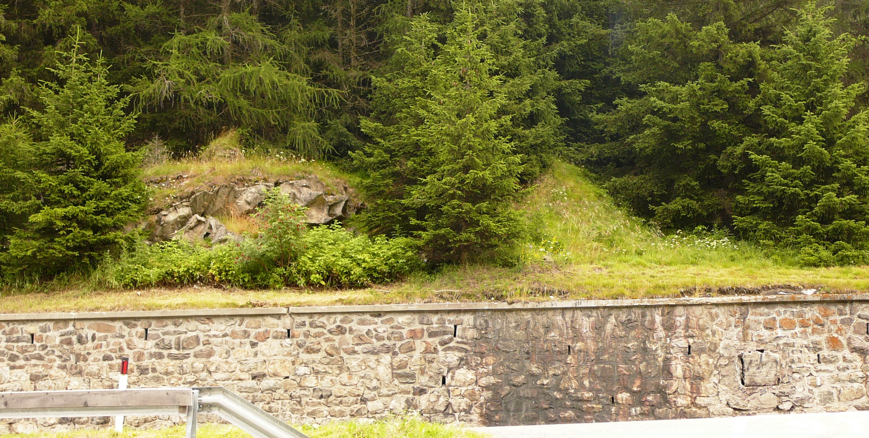 Opera II, sbarramento Resia